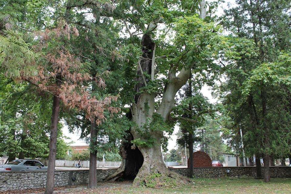 ძველი სენაკის 800-წლოვანი მუხა